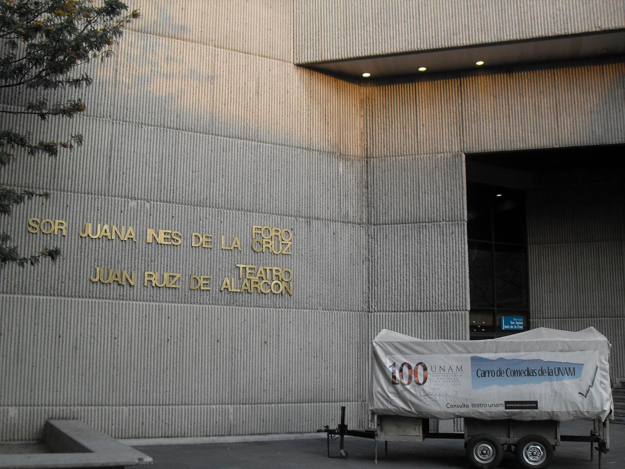 Estremeñu: Teatro Juan Ruiz de Alarcón y Foro Sor Juana Inés de la Cruz